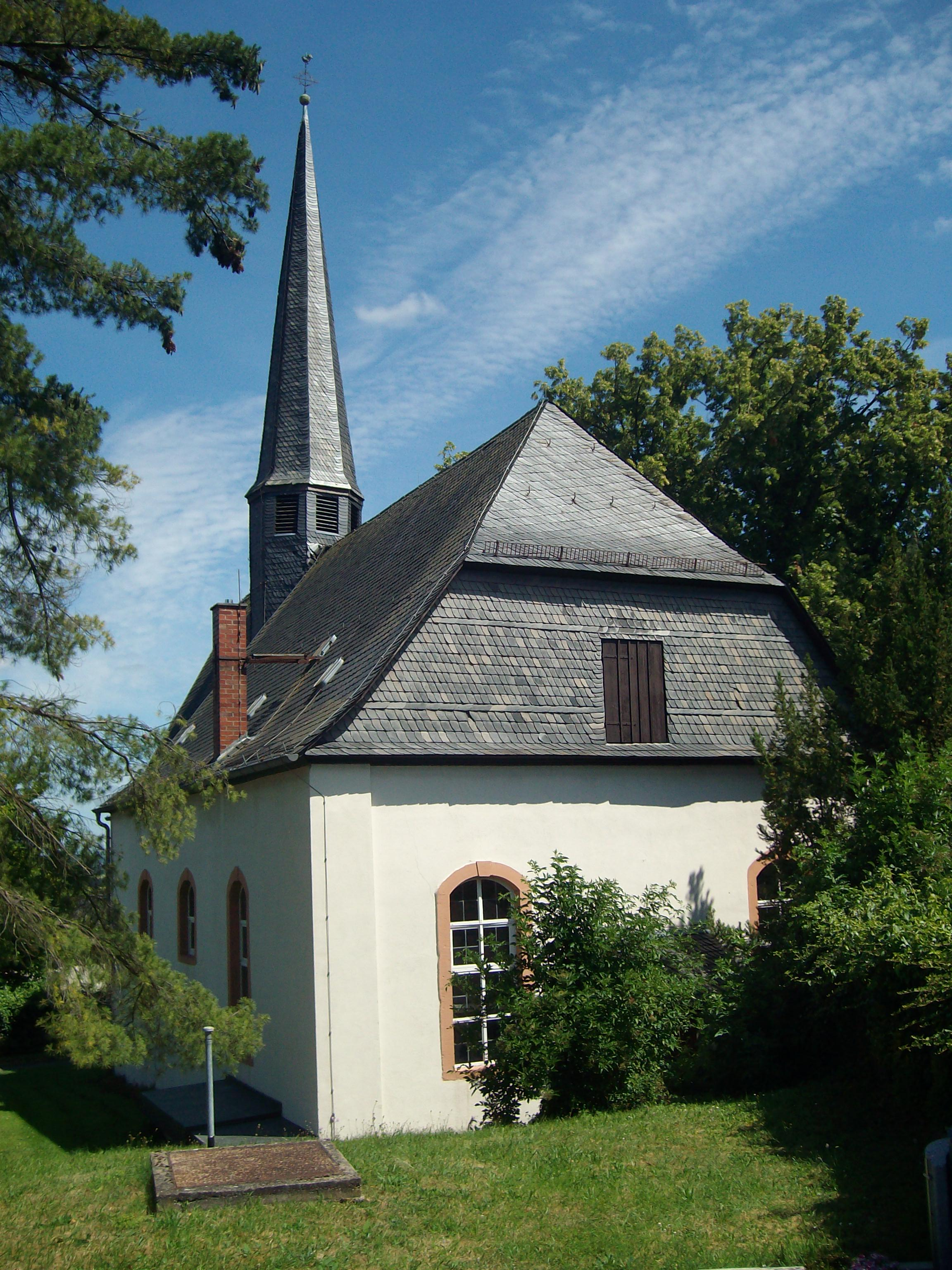 Evangelische Kirche in Obbornhofen, Hungen, Hessen, Deutschland